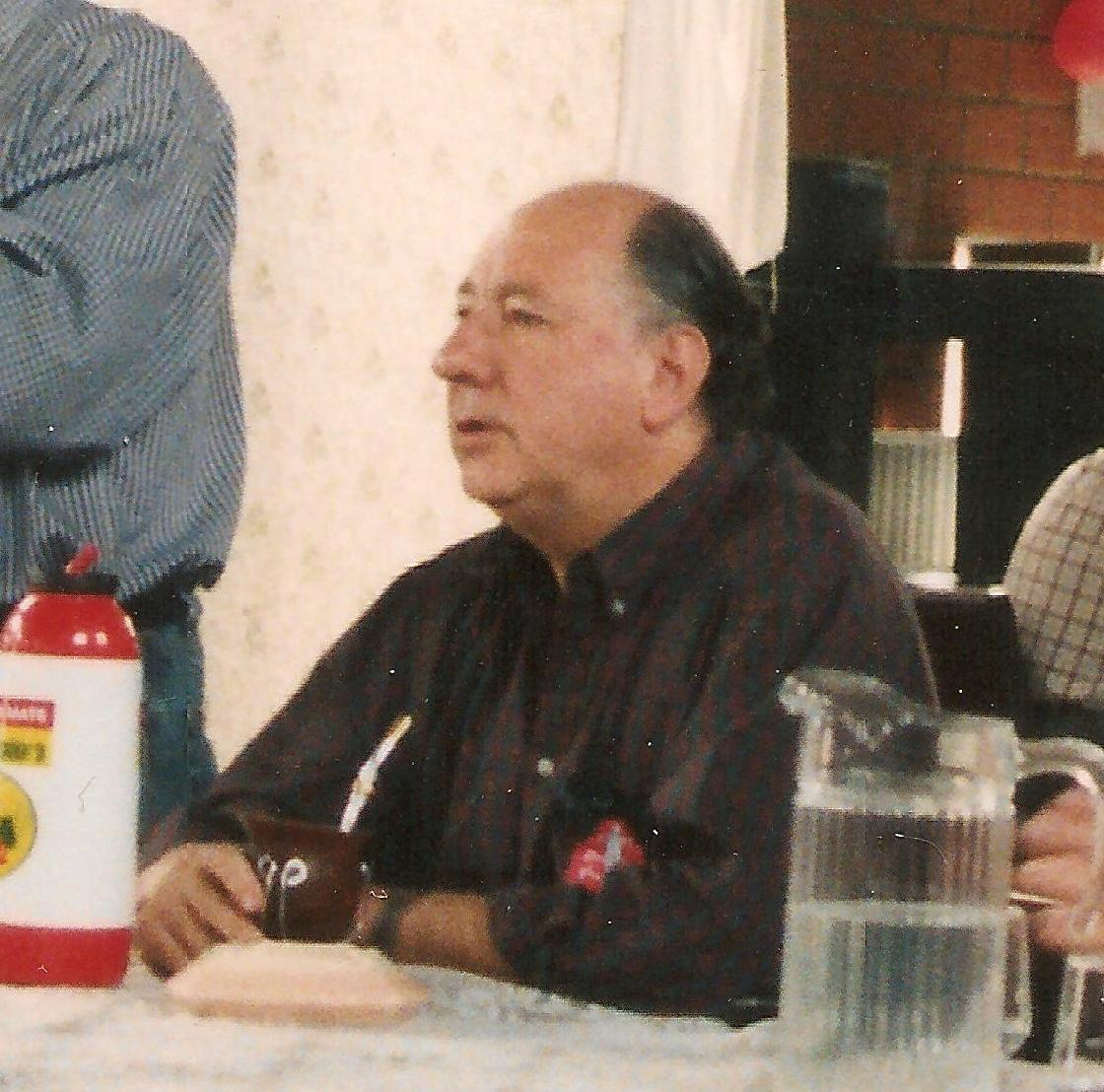 Acto de la ALIANZA en Jardín América (domingo 21 de septiembre de 1997). Lanzamiento de la candidatura de Miguel Ríos a diputado provincial. Estuvieron presentes, entre otros, Fernando Elías "Tulo" Llamosas, Eduardo "Balero" Torres, Ricardo Barrios Arrechea, Mario Losada y "Moncho" Closs.